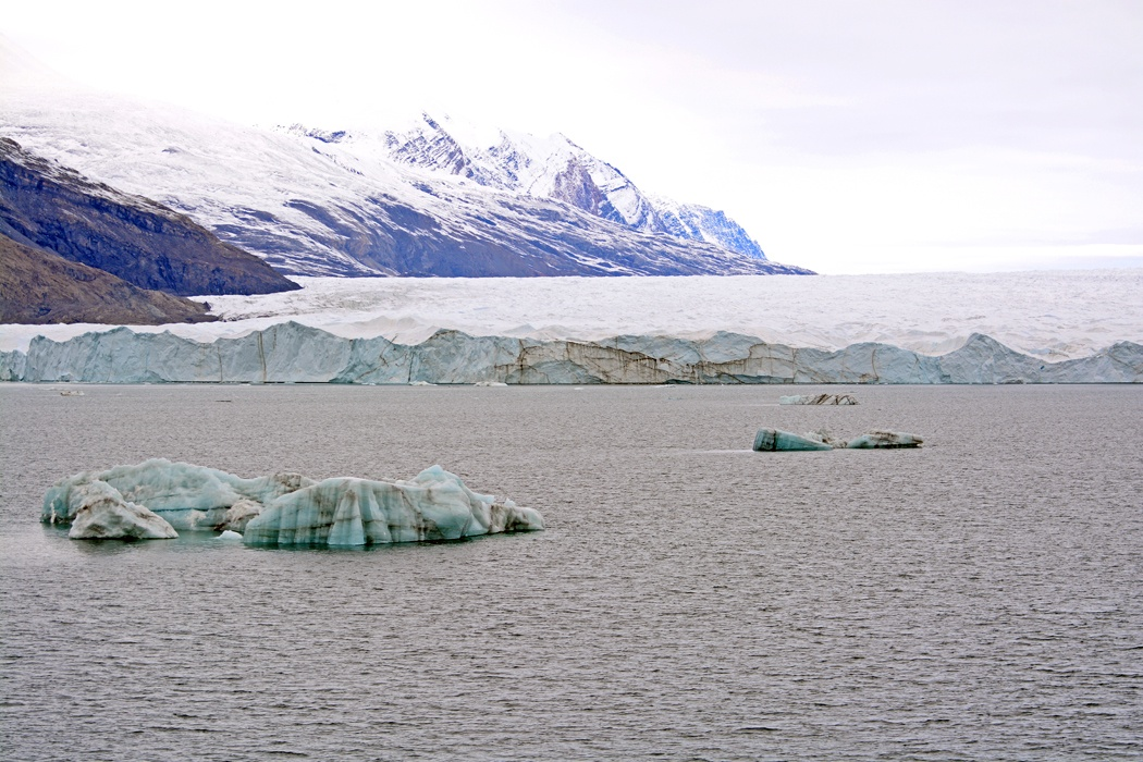 Der Waltershausen Gletscher am Ende des Kaiser-Franz-Josefs-Fjord